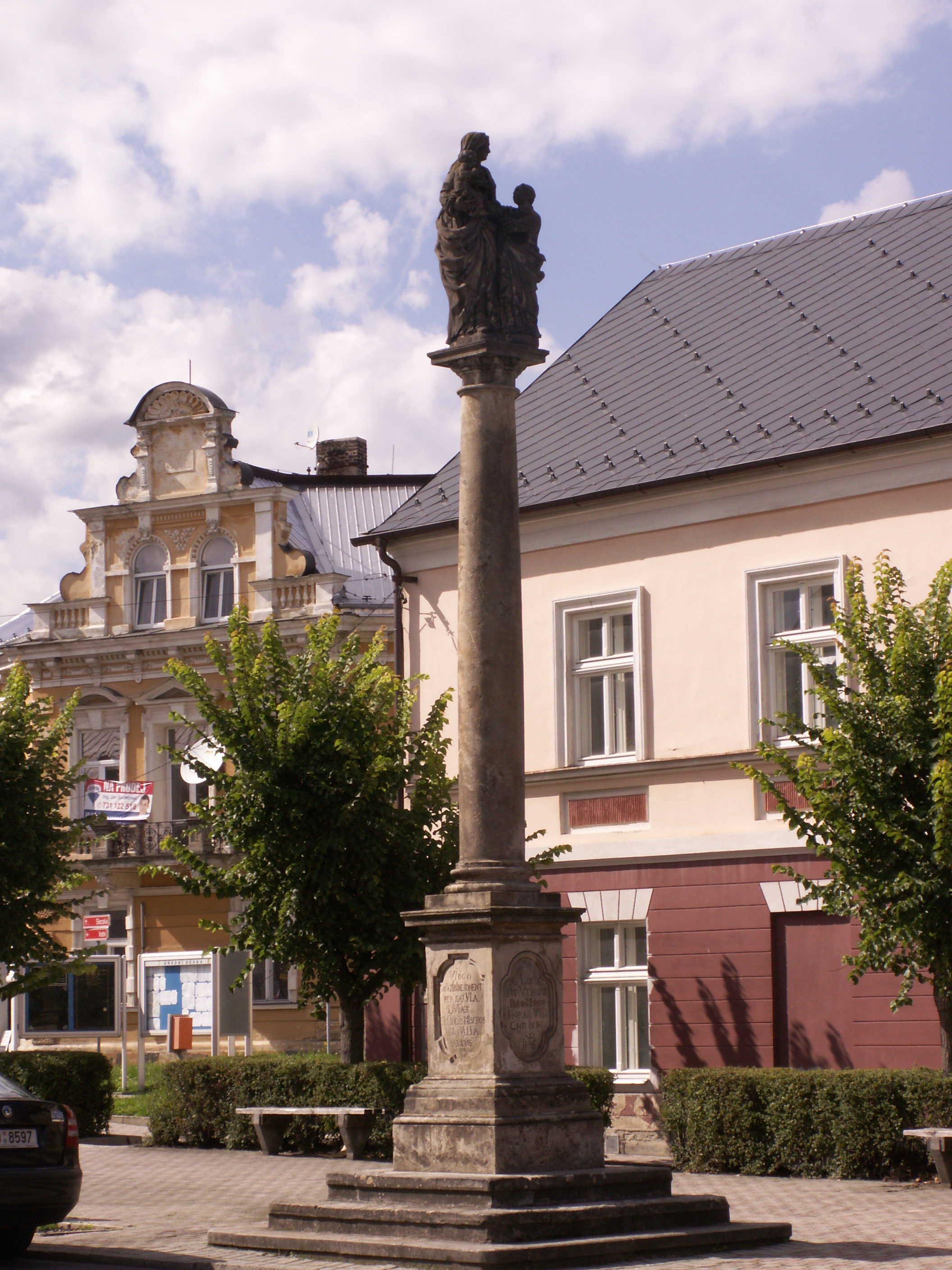 Sloup se sochou sv. Anny Samétřetí (Město Albrechtice), nám. ČSA, u čp. 21, Město Albrechtice, Město Albrechtice.